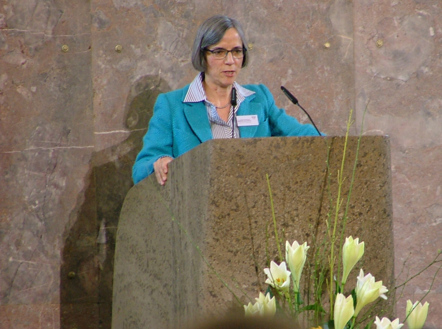 11. Mitgliederversammlung DOSB in der Frankfurter Paulskirche. Die DOSB-Mitgliedsorganisationen stimmte in einer außerordentlichen Mitgliederversammlung einstimmig dafür, dass Deutschland mit der Freien und Hansestadt Hamburg sich um die Olympischen und Paralympischen Spiele 2024 und gegebenfalls 2028 bewirbt. Hier: Sylvia Schenk